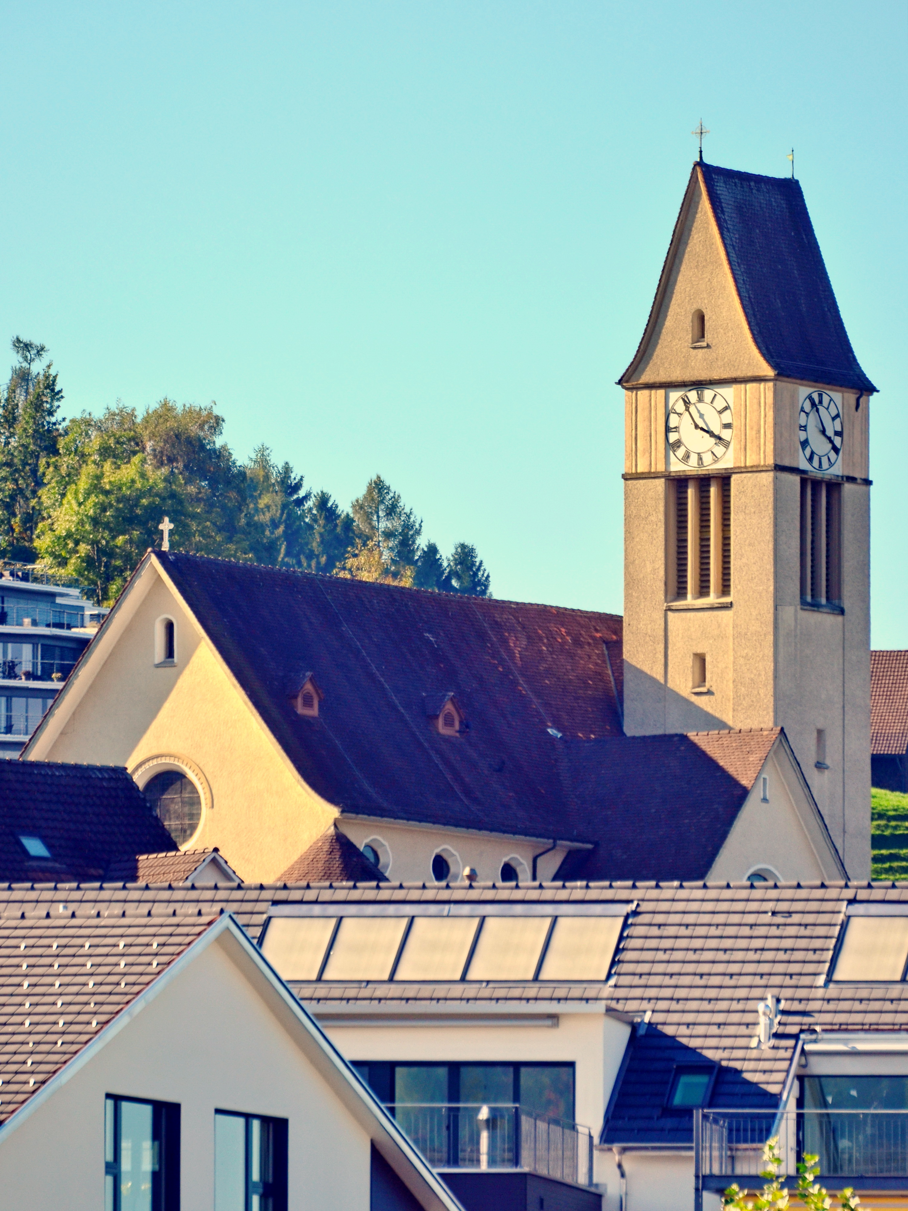 Richterswil as seen from Zürichsee-Schifffahrtsgesellschaft (ZSG) MS Panta Rhei on Zürichsee in Switzerland